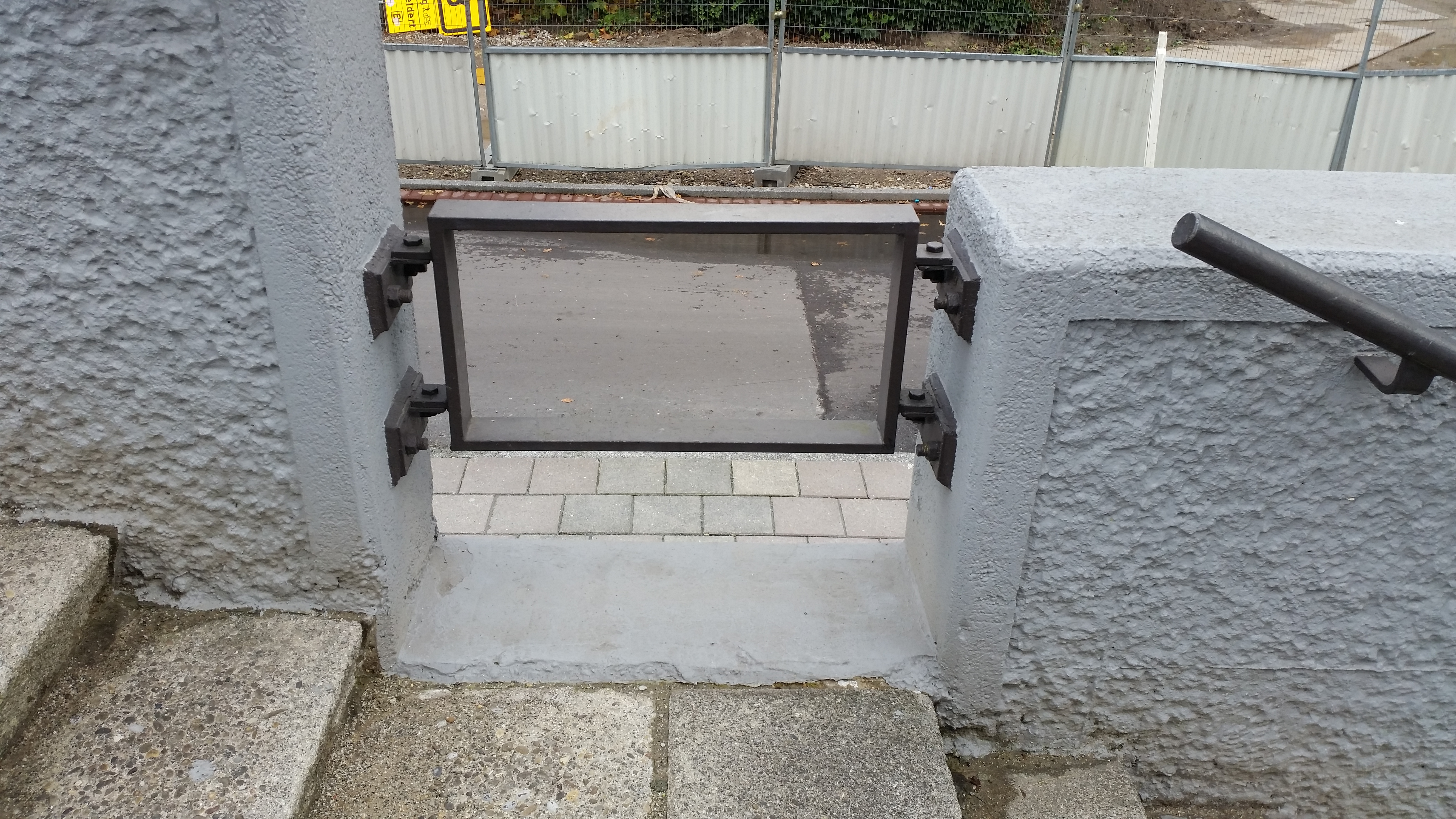 Brug 858 op de kruising Starwinskylaan en Parnassusweg, Amsterdam-Zuid